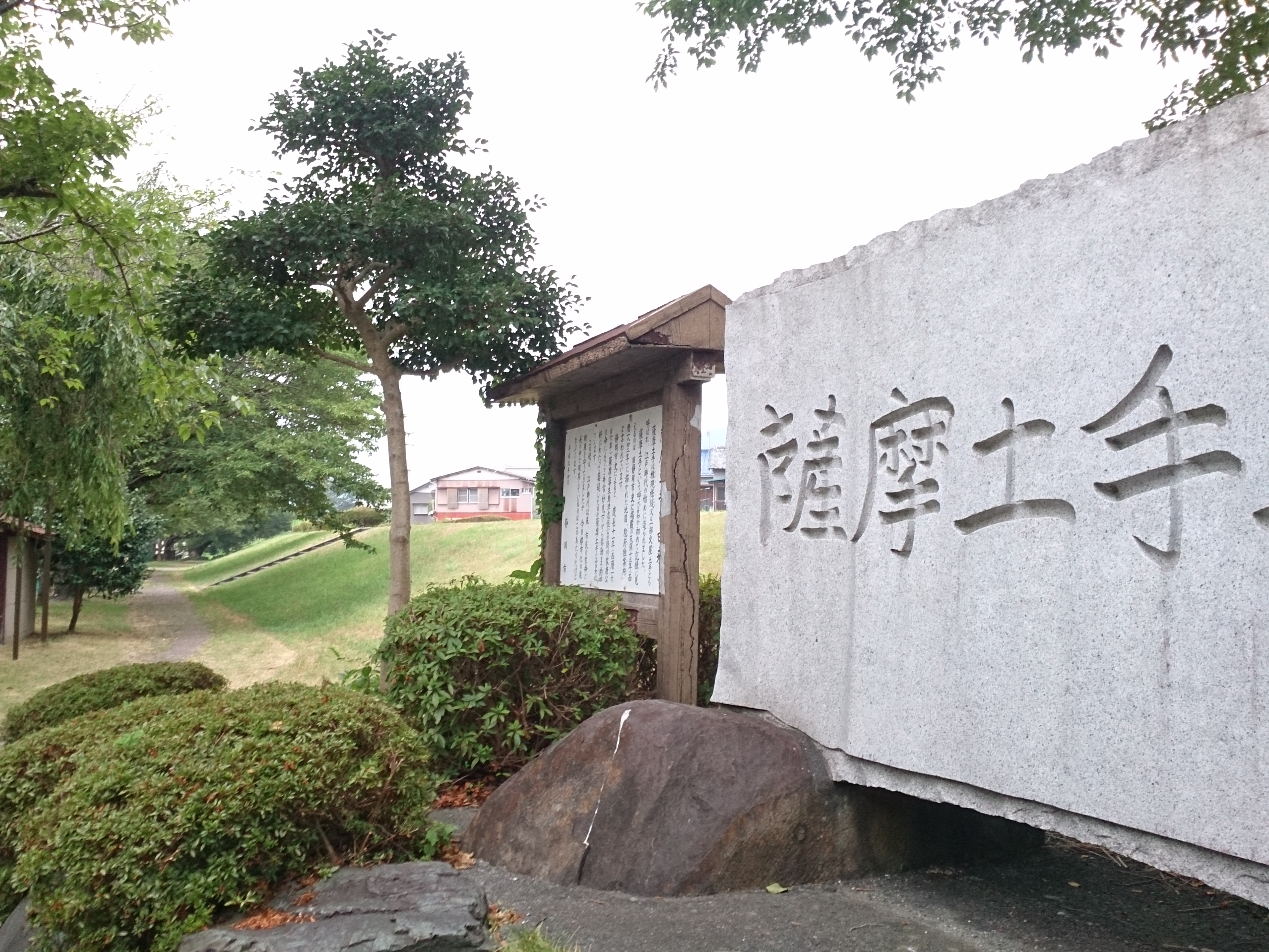 静岡県静岡市の薩摩土手（2015年8月8日撮影）